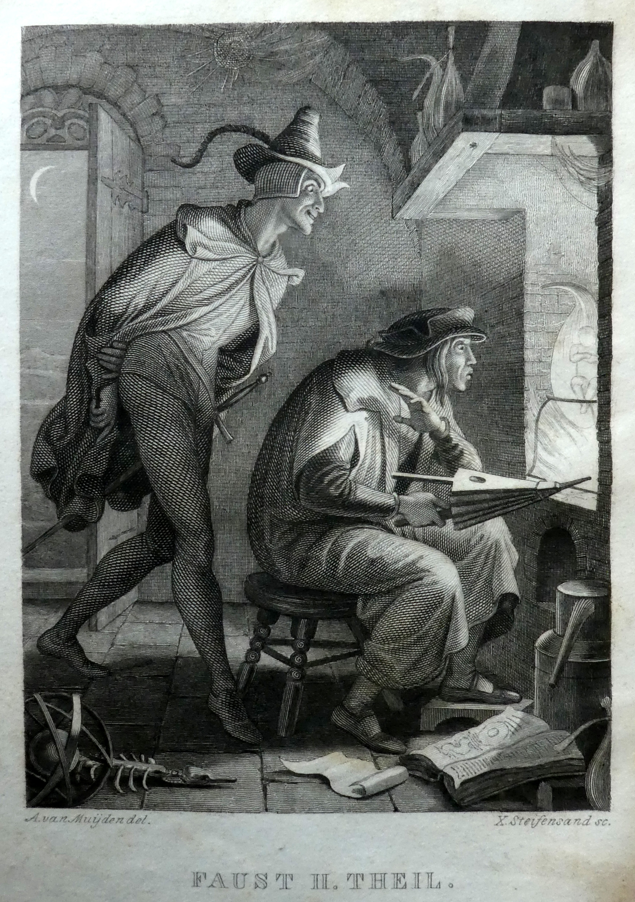 Szene: Laboratorium / Wagner erschafft den Homunculus